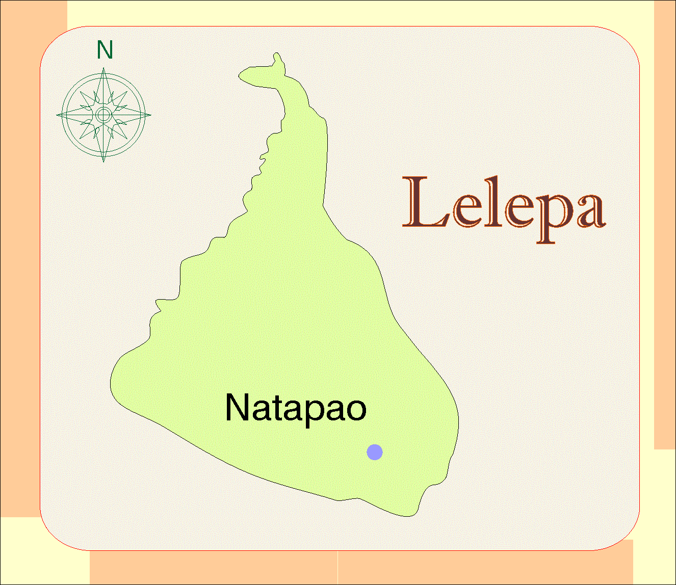 Автор: Галина Йорданова Summary Карта на остров Лелепа.